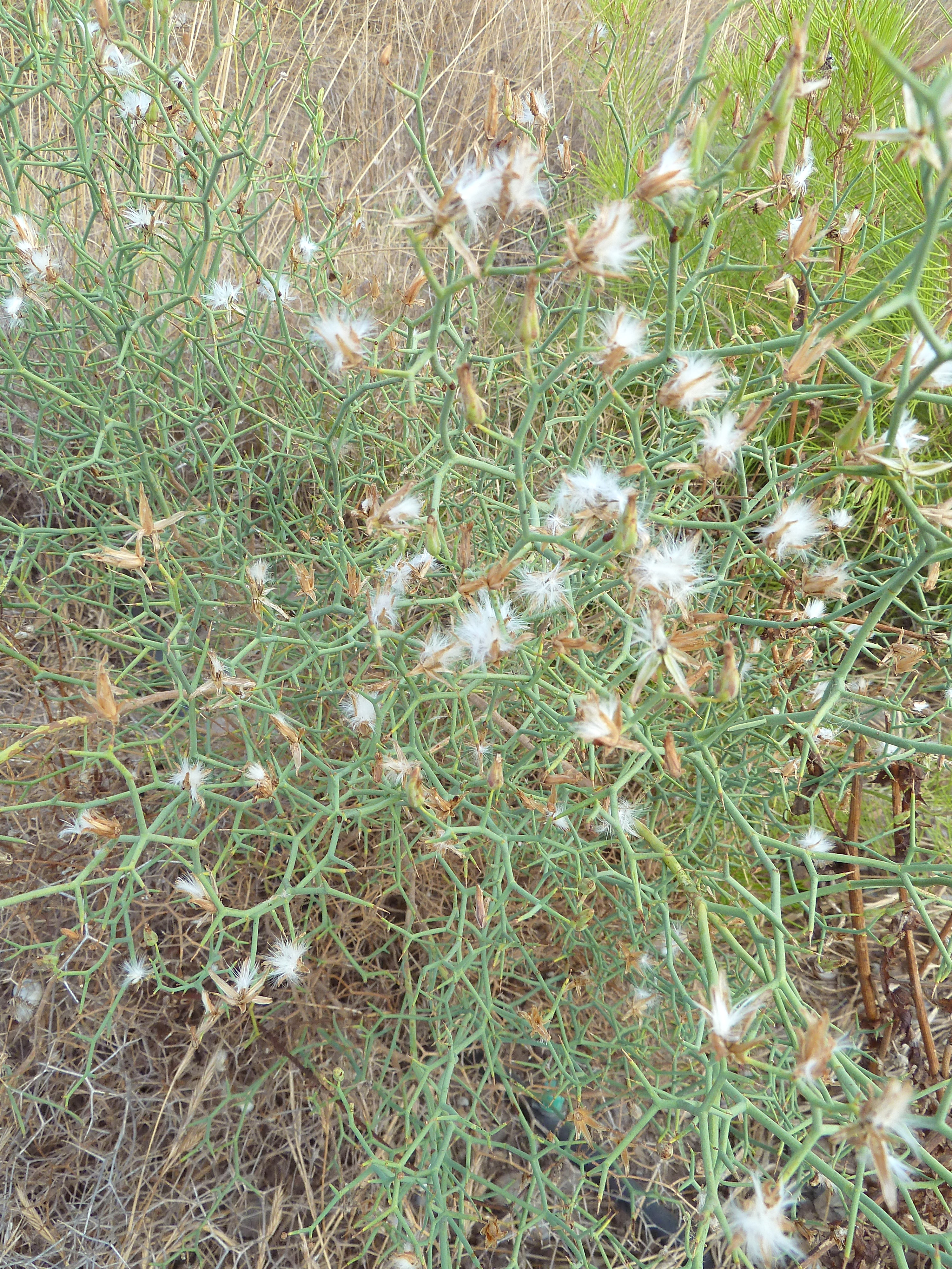 Launaea arborescens (Aulaga morisca) - Aspecto general con los capítulos en fructificación. - Descampado circa Polígono 'El Labradorcico', Águilas (Provincia de Murcia, España).